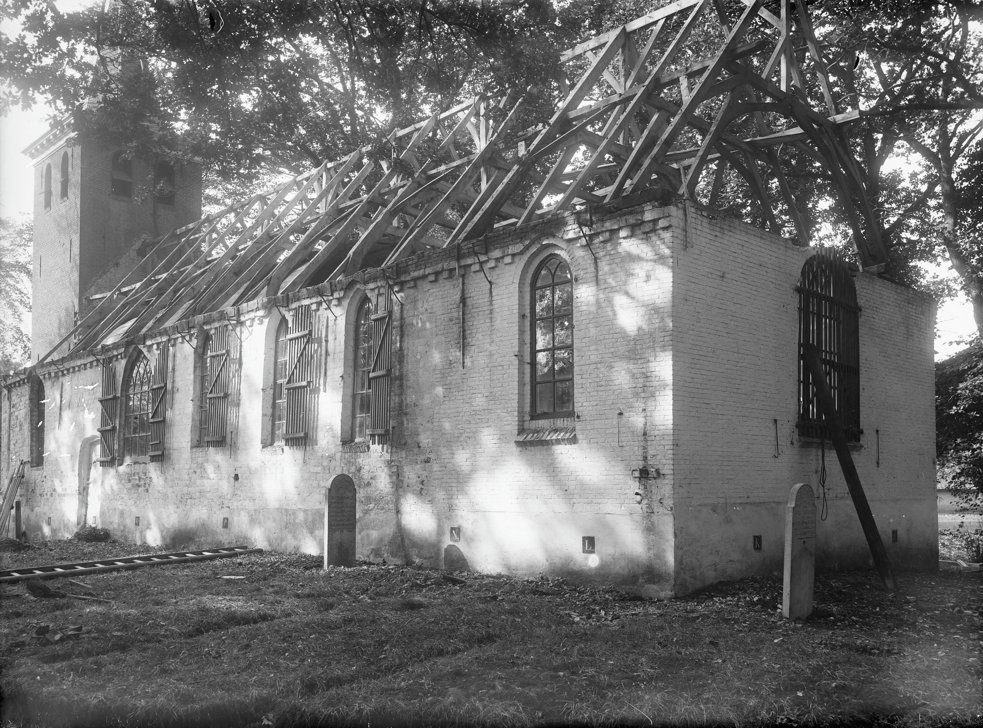 Nederlands Hervormde Kerk: kerk vanuit het zuid-westen en vanuit het zuid-oosten